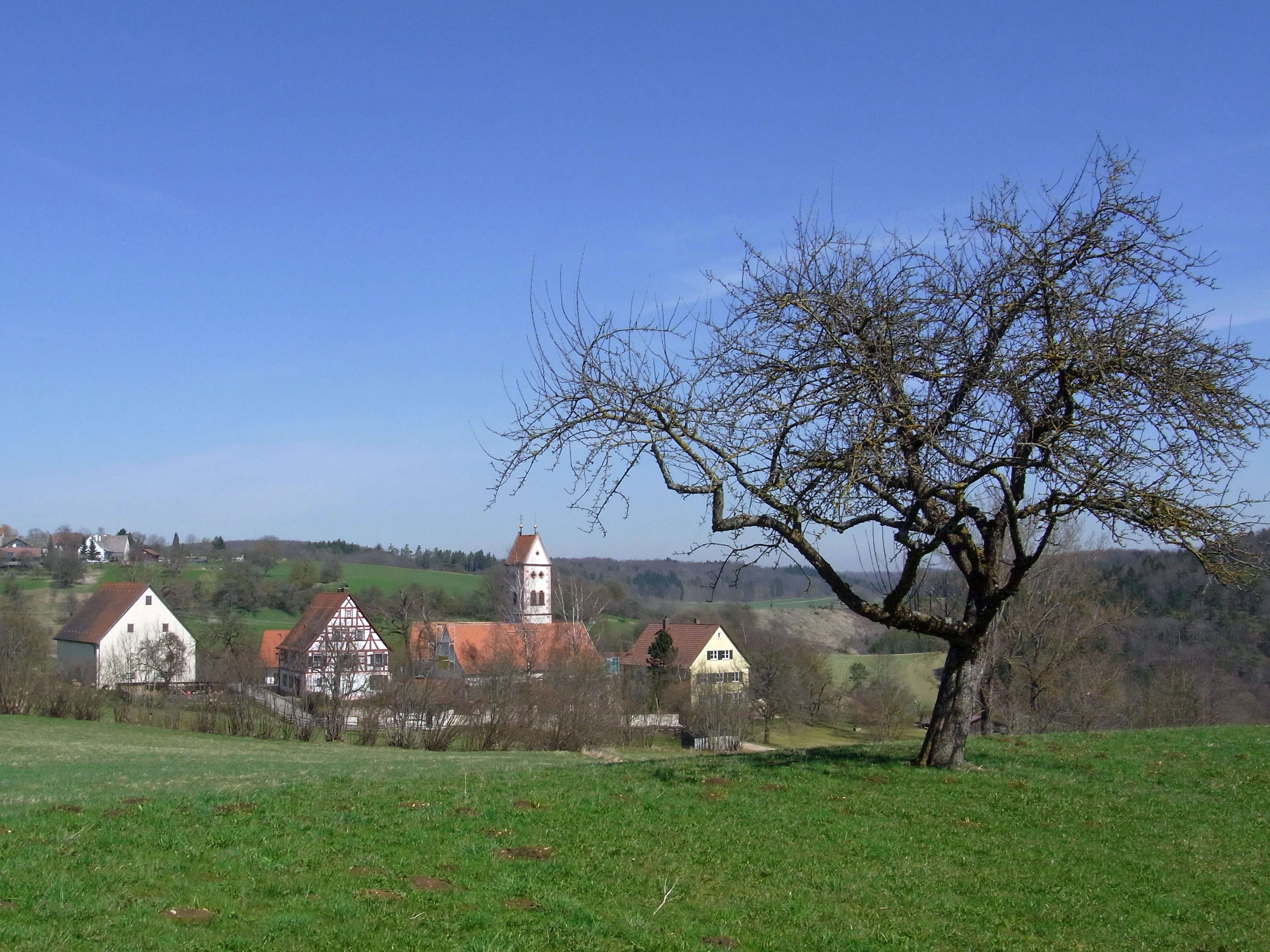 Langenenslingen-Emerfeld: Ort mit Pfarrkirche St. Pankratius